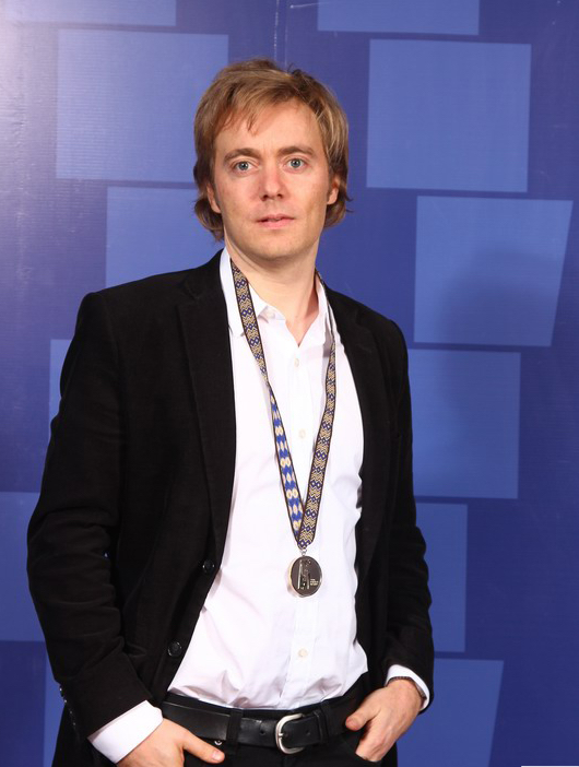 Premios Altazor 2015